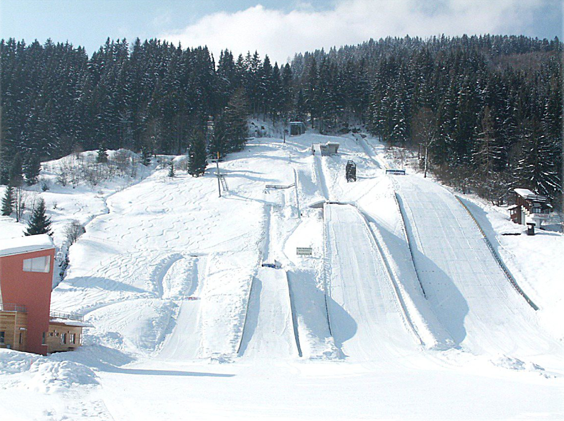 Digitalfotografie - Ausschnitt bearbeitet mit Photo Draw aufgenommen am 23.2.2005